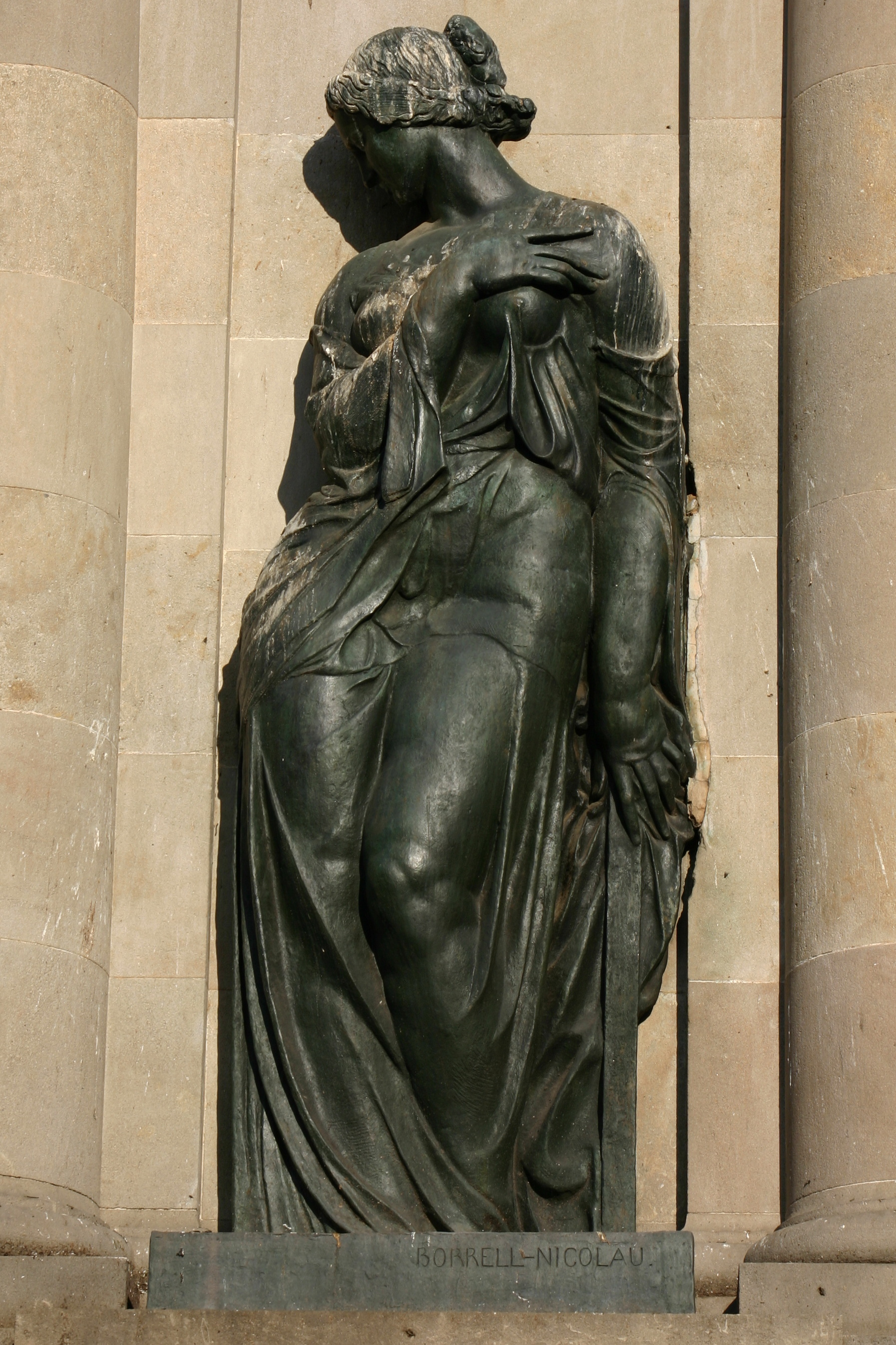 Dona. Plaza Catalunya. Barcelona (Spain)